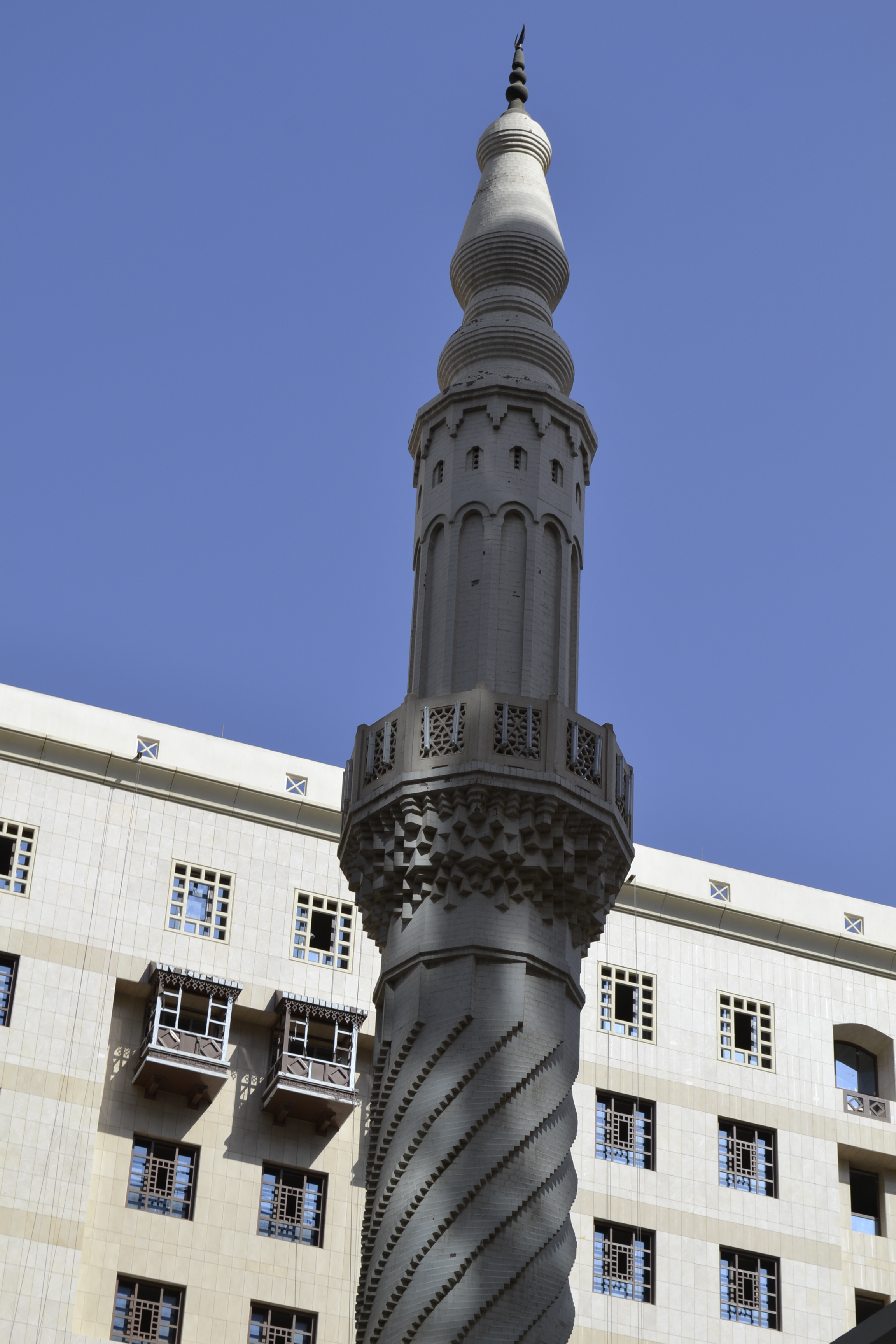 Menara Masjid Imam Bukhari